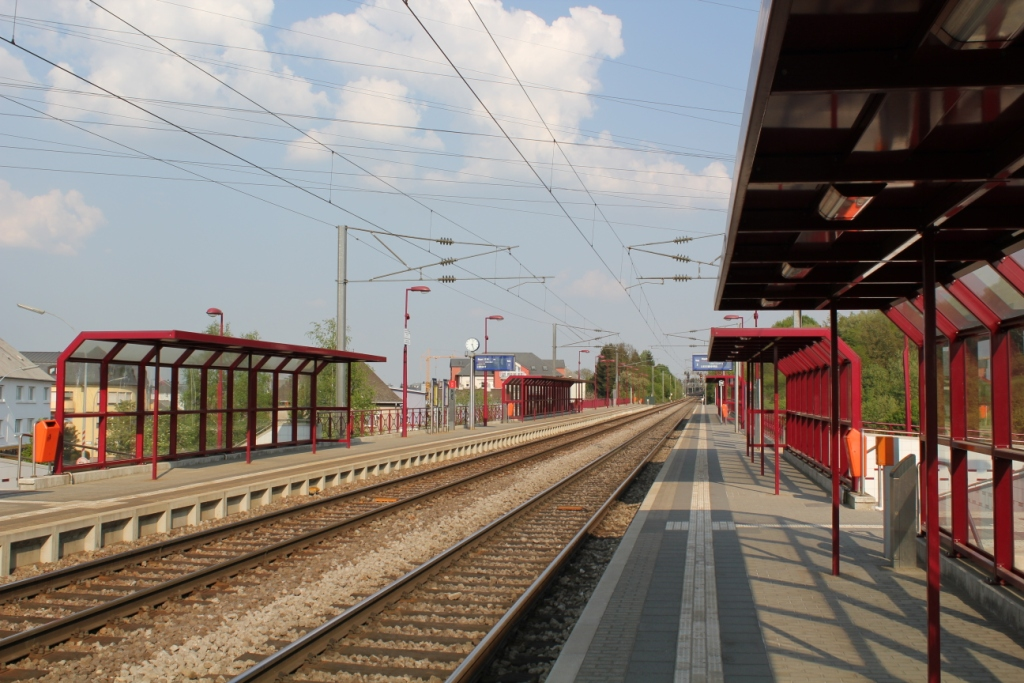 D'Gare zu Rolleng.